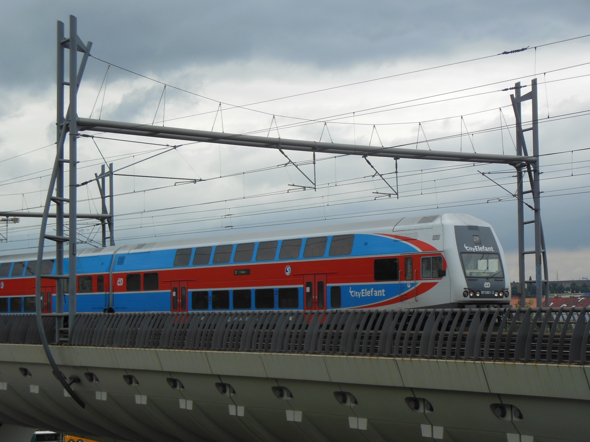 Elektrická jednotka 471 CityElefant na viaduktu Nového spojení v Praze.